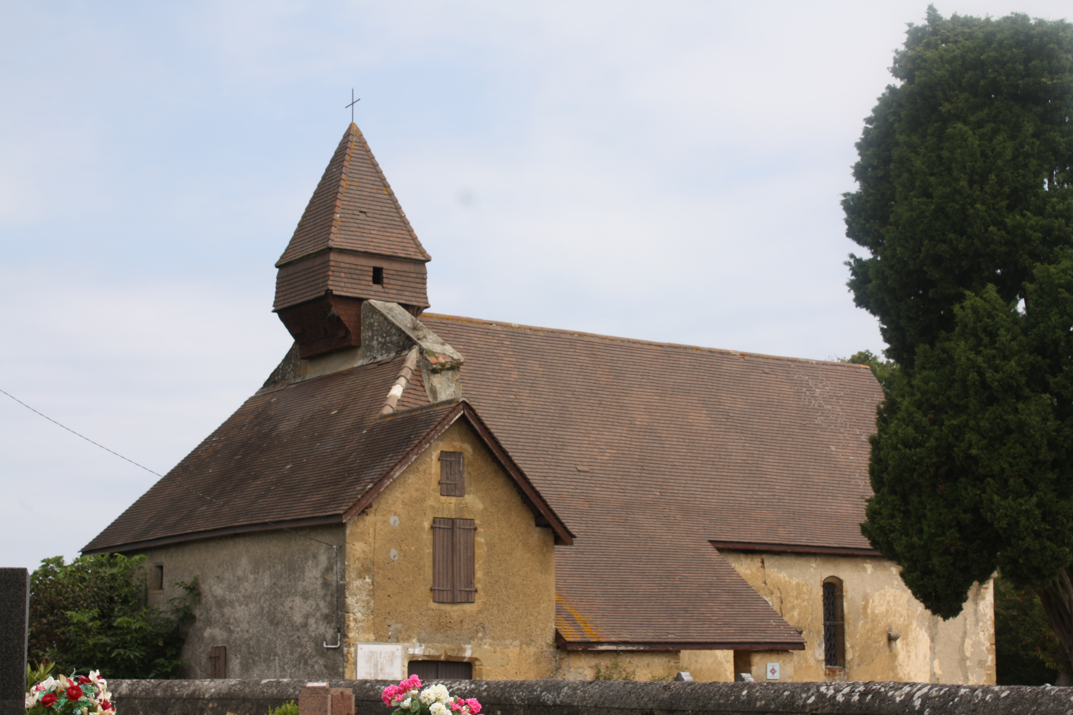 Église Saint-Martin de Lasserreéglise et portail du cimetière